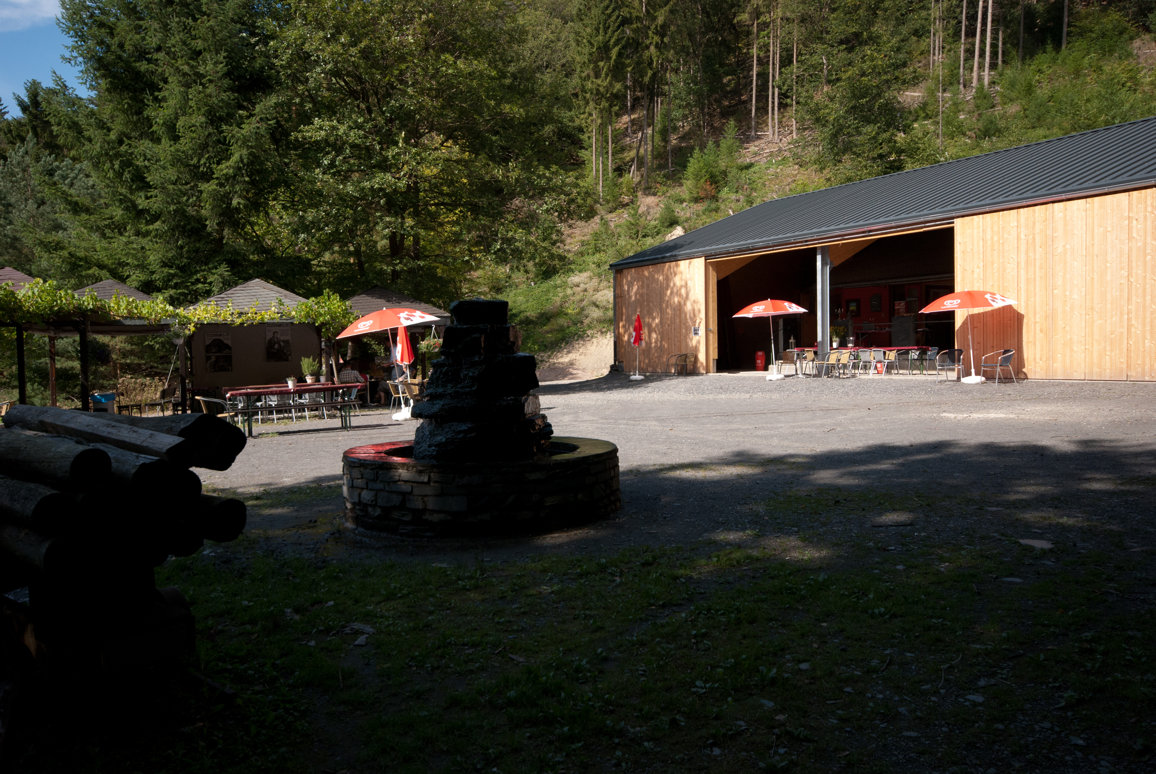 Das Museum und die Terrasse am Besucherbergwerk Fell